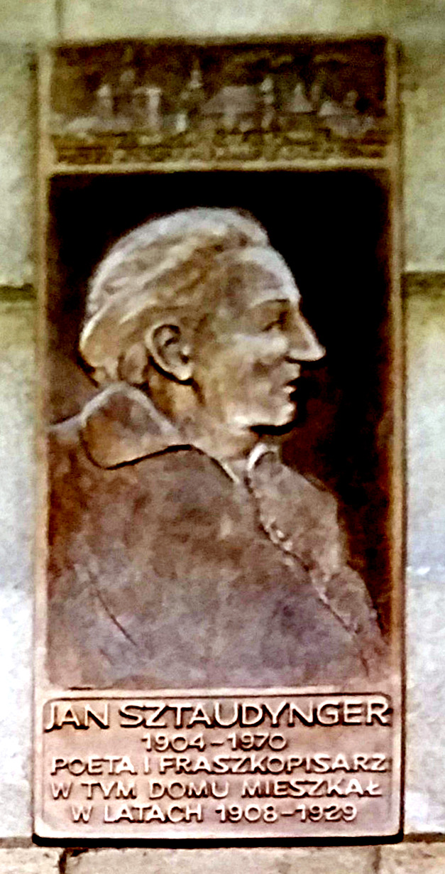 Tablica w Krakowie - ul. Długa - gdzie mieszkał Jan Sztaudynger w latach 1908-1929